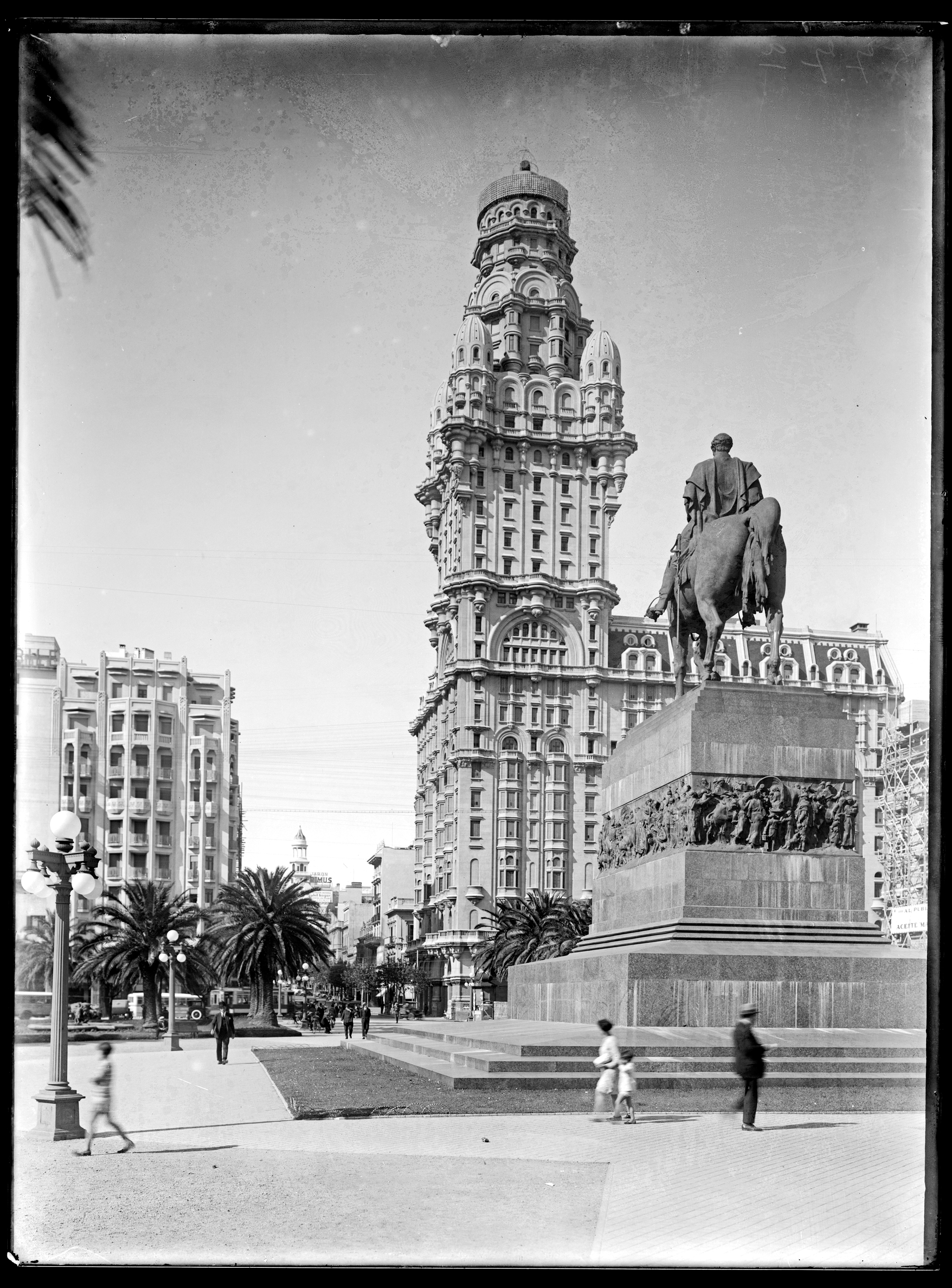 Plaza Independencia. Al centro: monumento homenaje a José Gervasio Artigas y Palacio Salvo.